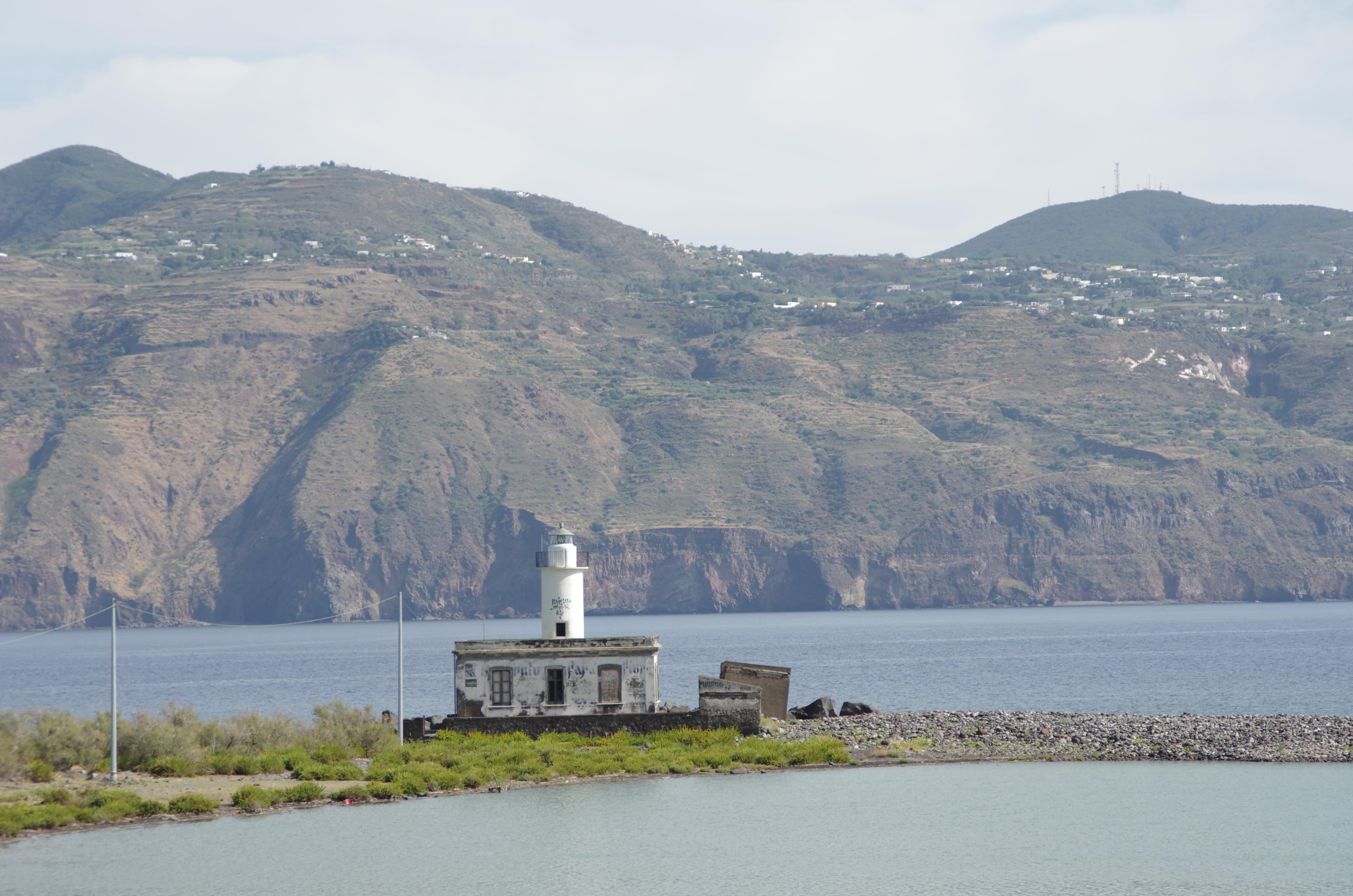 Salina in der Region Sizilien. Der Leuchtturm an der Saline auf Salina. Im Hintergrund befindet sich die Insel Lipari.